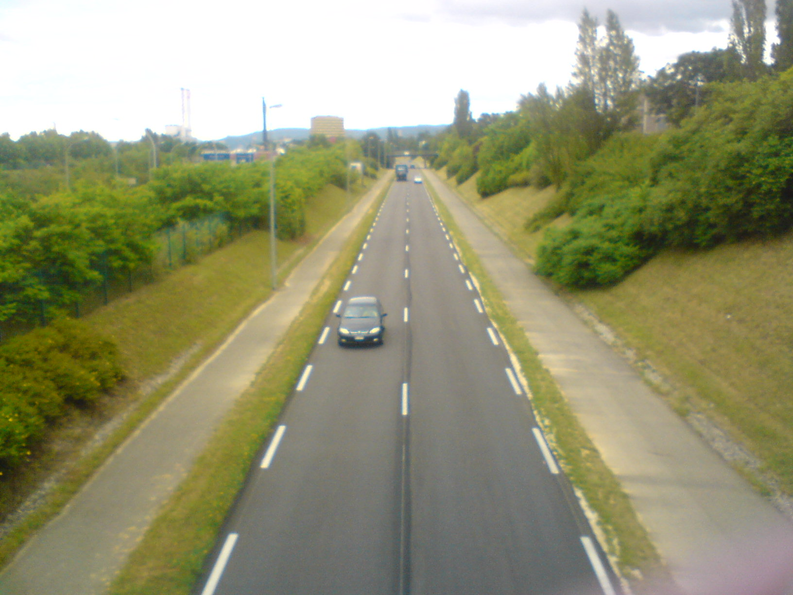 "Route douanière" reliant Bâle (en Suisse) à l'EuroAirport (situé en France), tout en ayant aucune connexion avec une route française, malgré le fait que la route se situe sur ce dernier pays.